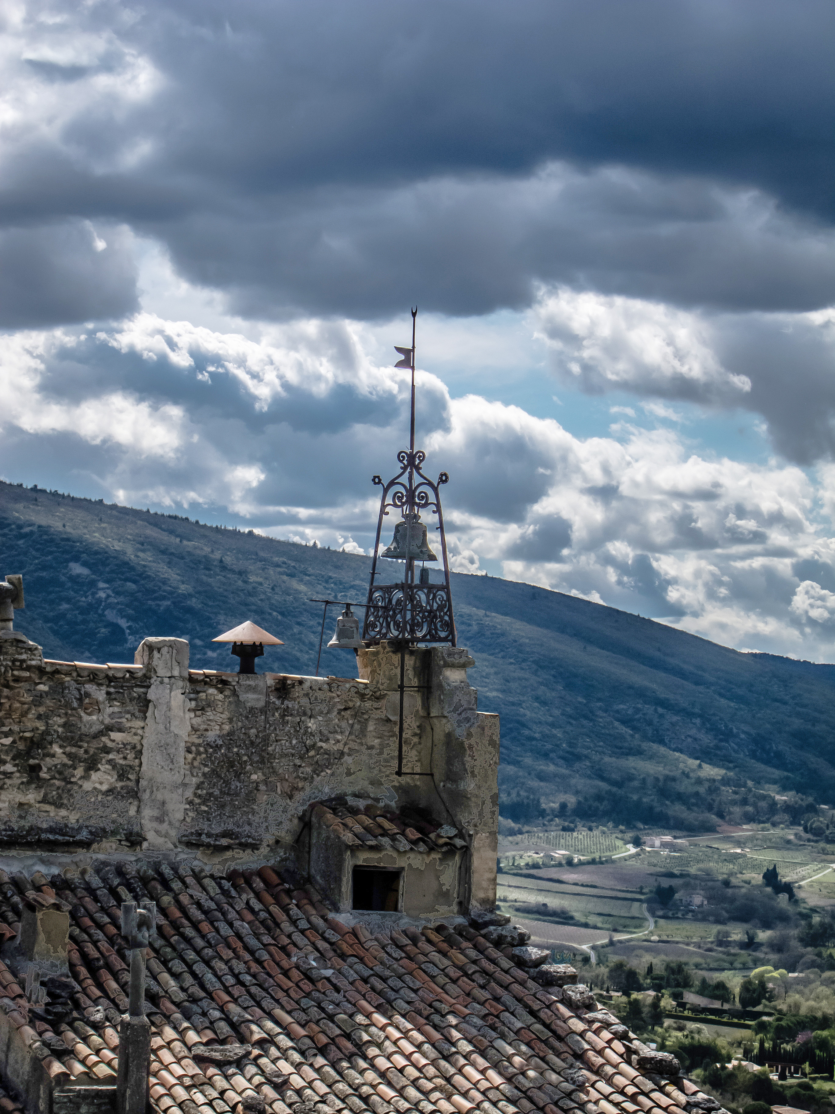 Nuages d'orage au dessus de Bonnieux